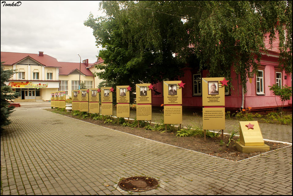 Нароўля. Алея герояў і школа мастацтваў